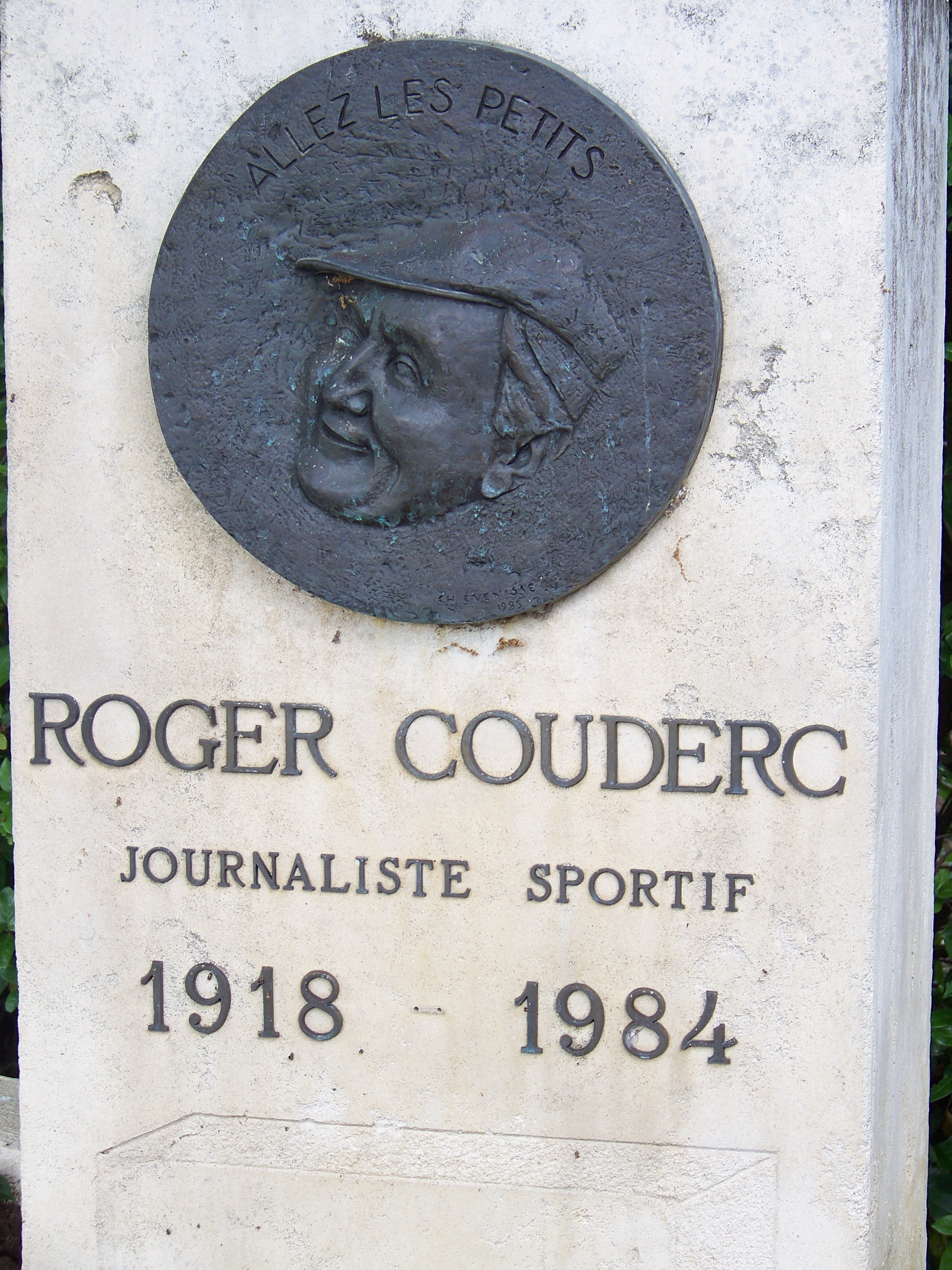 Médaillon et stèle "Roger Couderc" à Mauvezin (Gers)